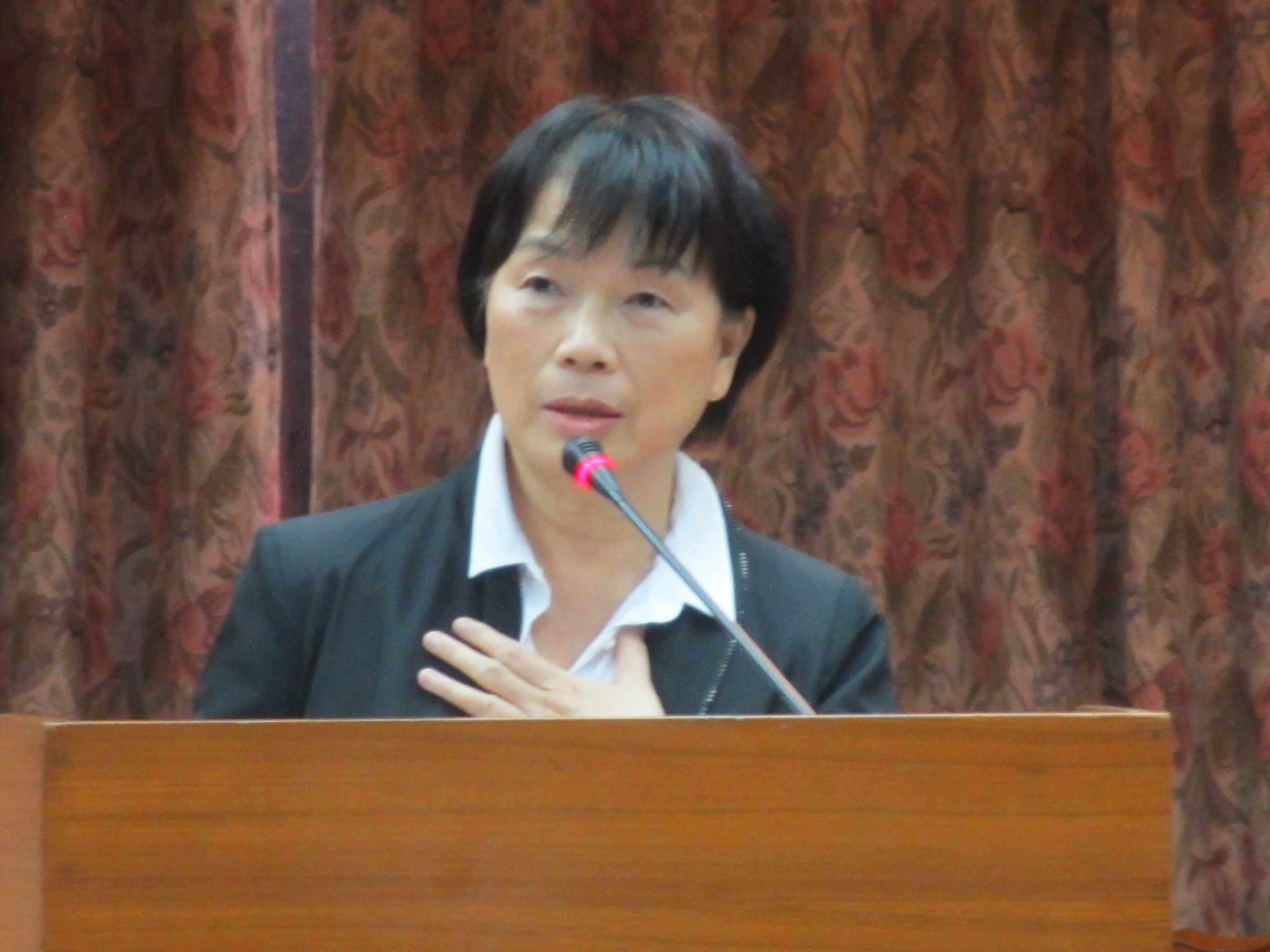 中文（台灣）: 台灣文化部長龍應台(美國之音張永泰拍攝)